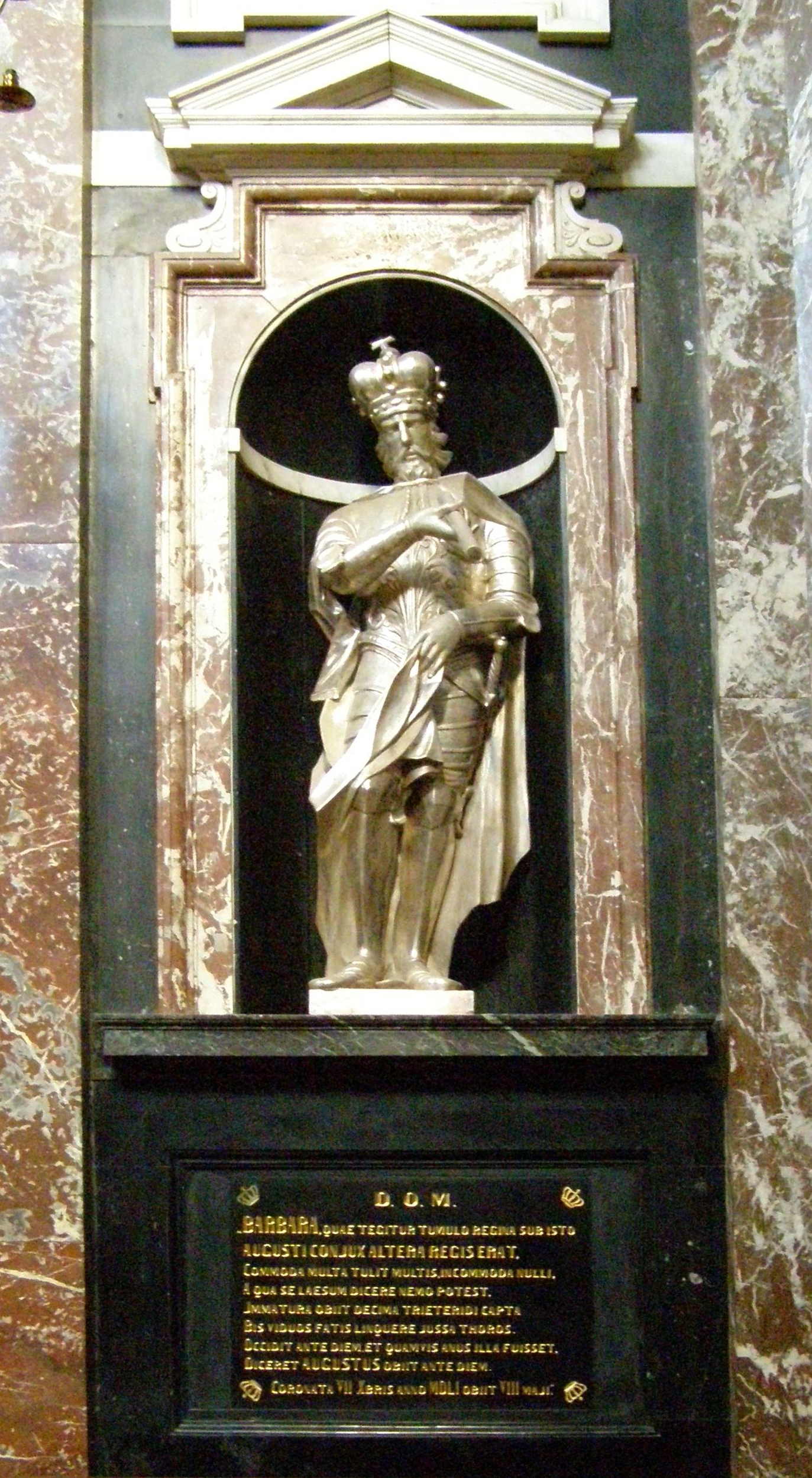 Epitafium Barbary Radziwiłłówny w kaplicy św. Kazimierza w katedrze wileńskiej